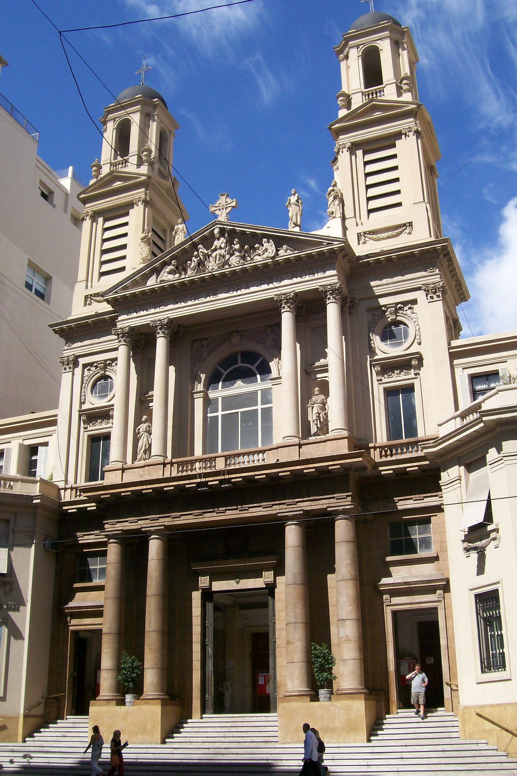 Iglesia de San Nicolás, Buenos Aires